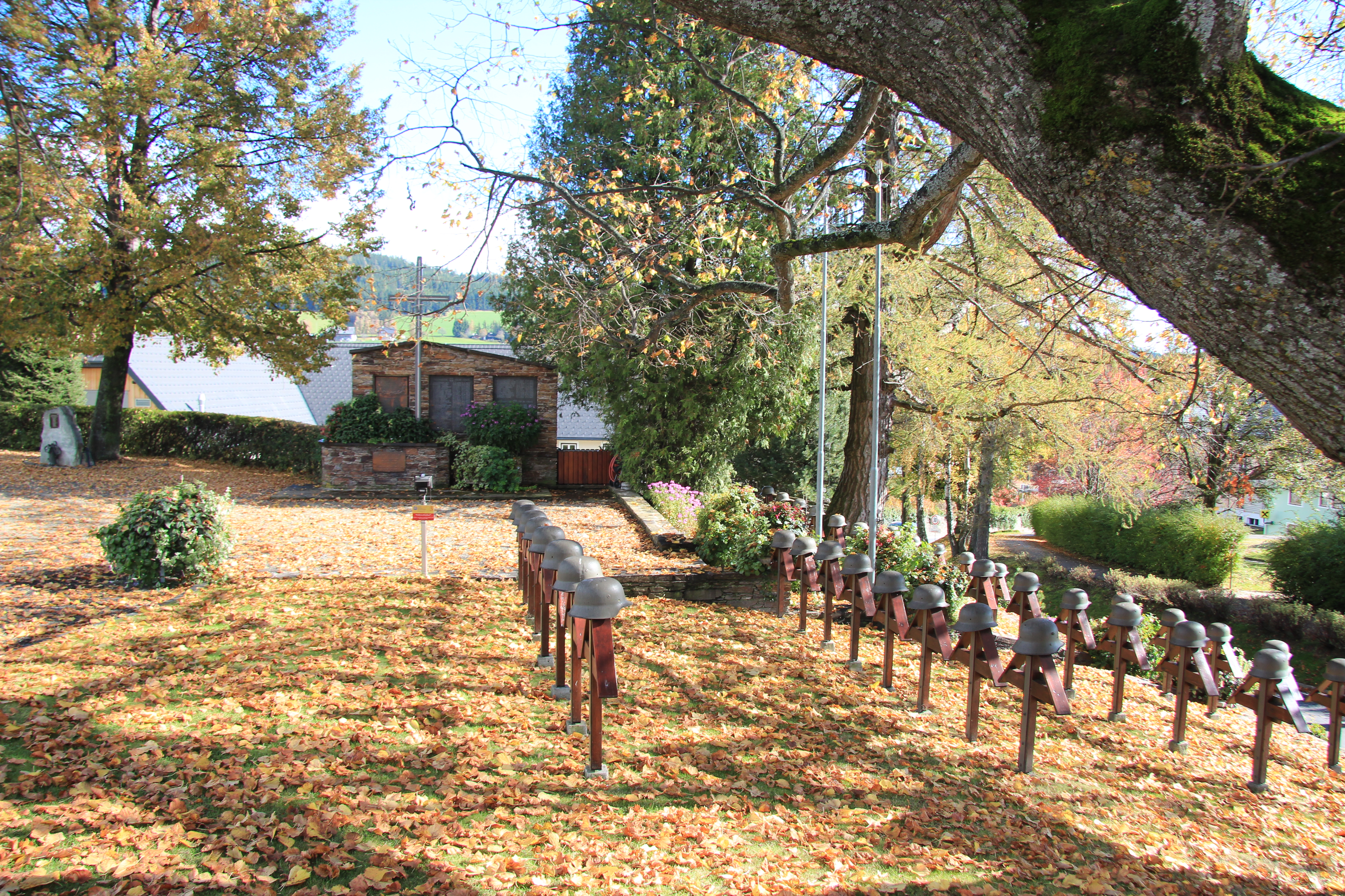 Sankt Jakob im Walde im steirischen Joglland